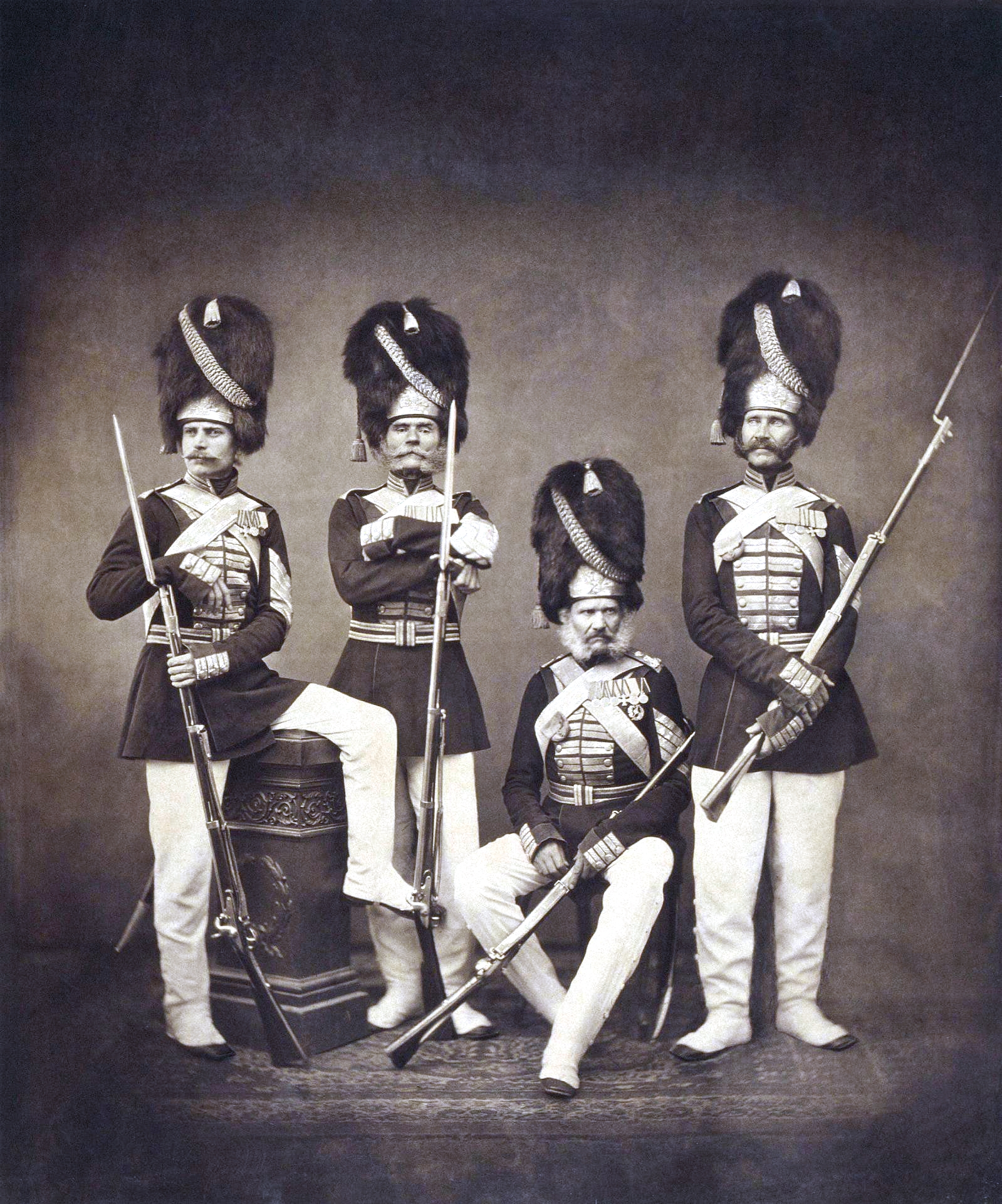 Портрет группы дворцовых гренадер. Россия, 1870-80 гг.